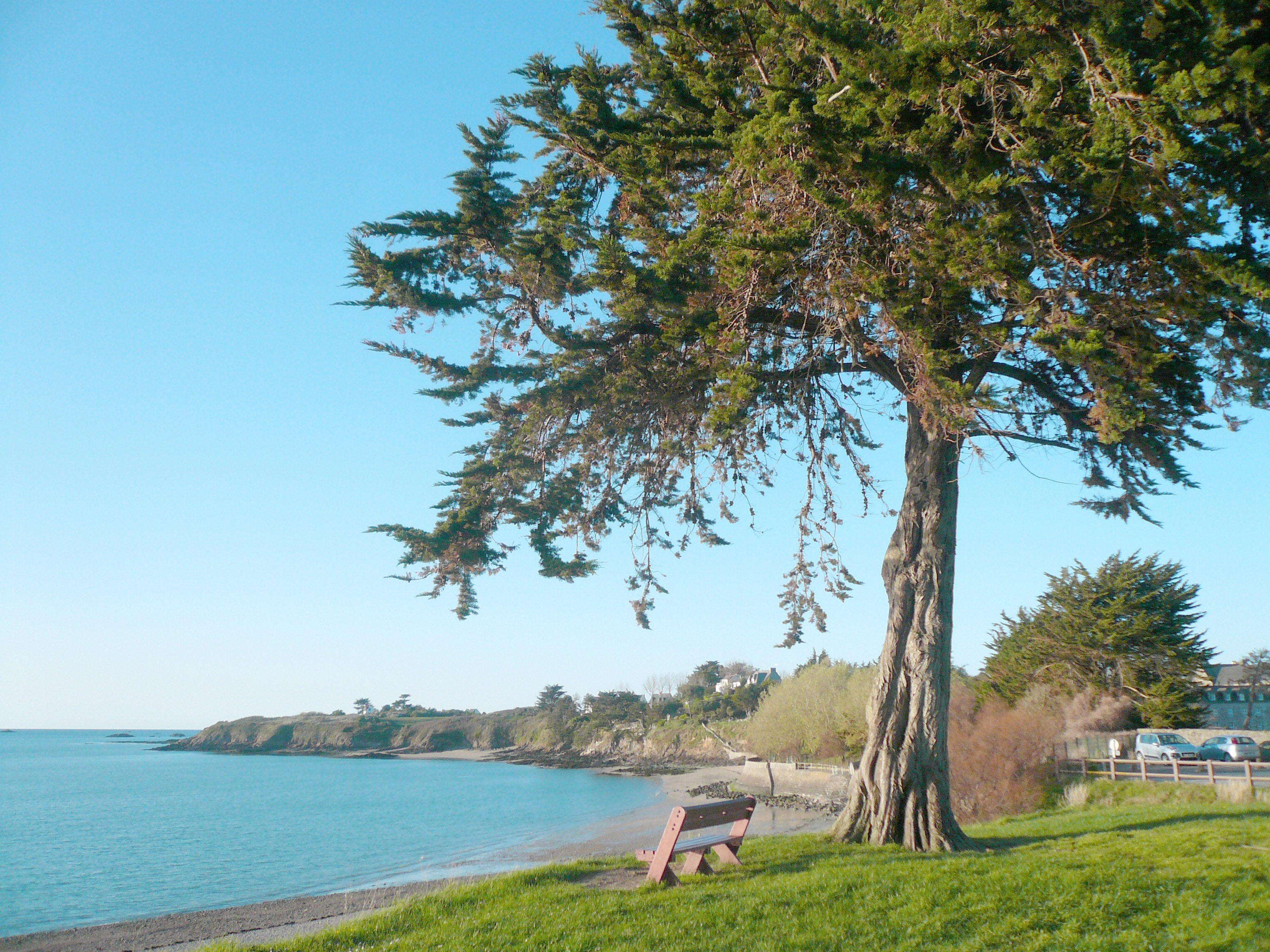 Beau cadre paisible au-dessus de la plage des Haas à Saint-Jacut-de-la-Mer (22).